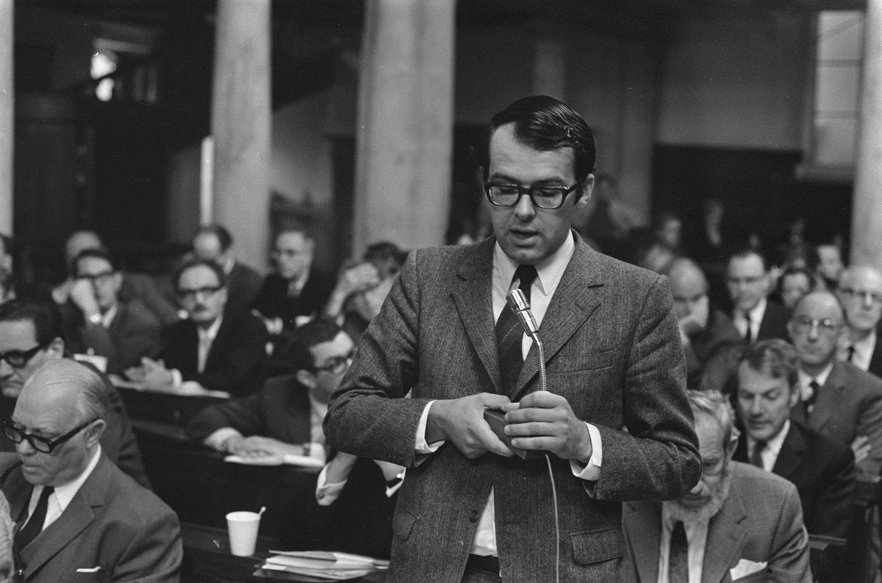 Collectie / Archief : Fotocollectie Anefo Reportage / Serie : Senaatsvergadering UvA over het beleid rector-magnificus prof. Belinfante Beschrijving : Professor S. C. Dik aan het woord Datum : 2 juli 1970 Locatie : Amsterdam, Noord-Holland Trefwoorden : bestuurlijke hervormingen, hoogleraren, universiteiten, vergaderingen Persoonsnaam : Dik, S. C. Fotograaf : Fotograaf Onbekend / Anefo, [onbekend] Auteursrechthebbende : Nationaal Archief Materiaalsoort : Negatief (zwart/wit) Nummer archiefinventaris : bekijk toegang 2.24.01.05 Bestanddeelnummer : 923-6406